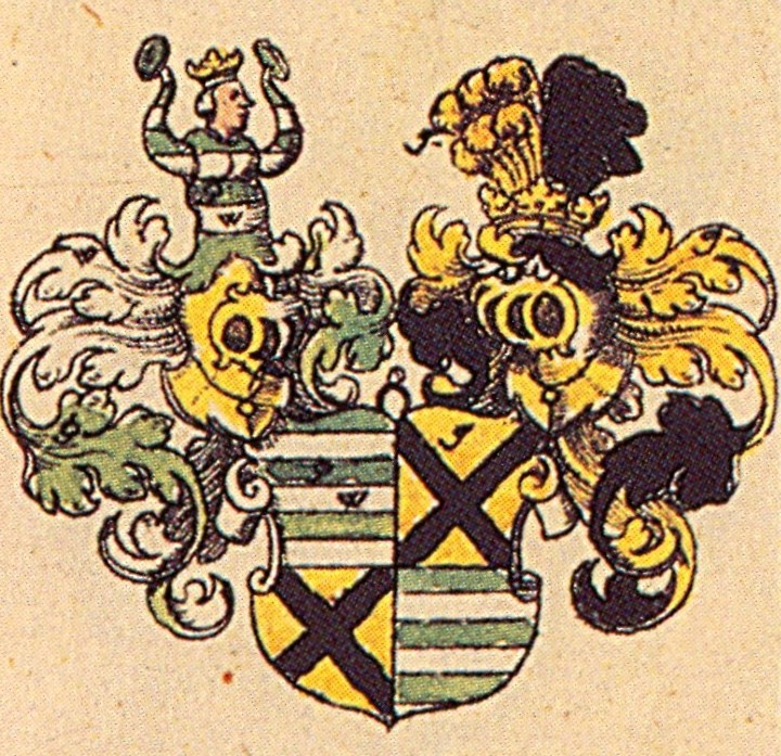 vermehrtes Wappen der Freiherren von Fleckenstein